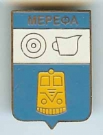 Герб Мерефи: зображення